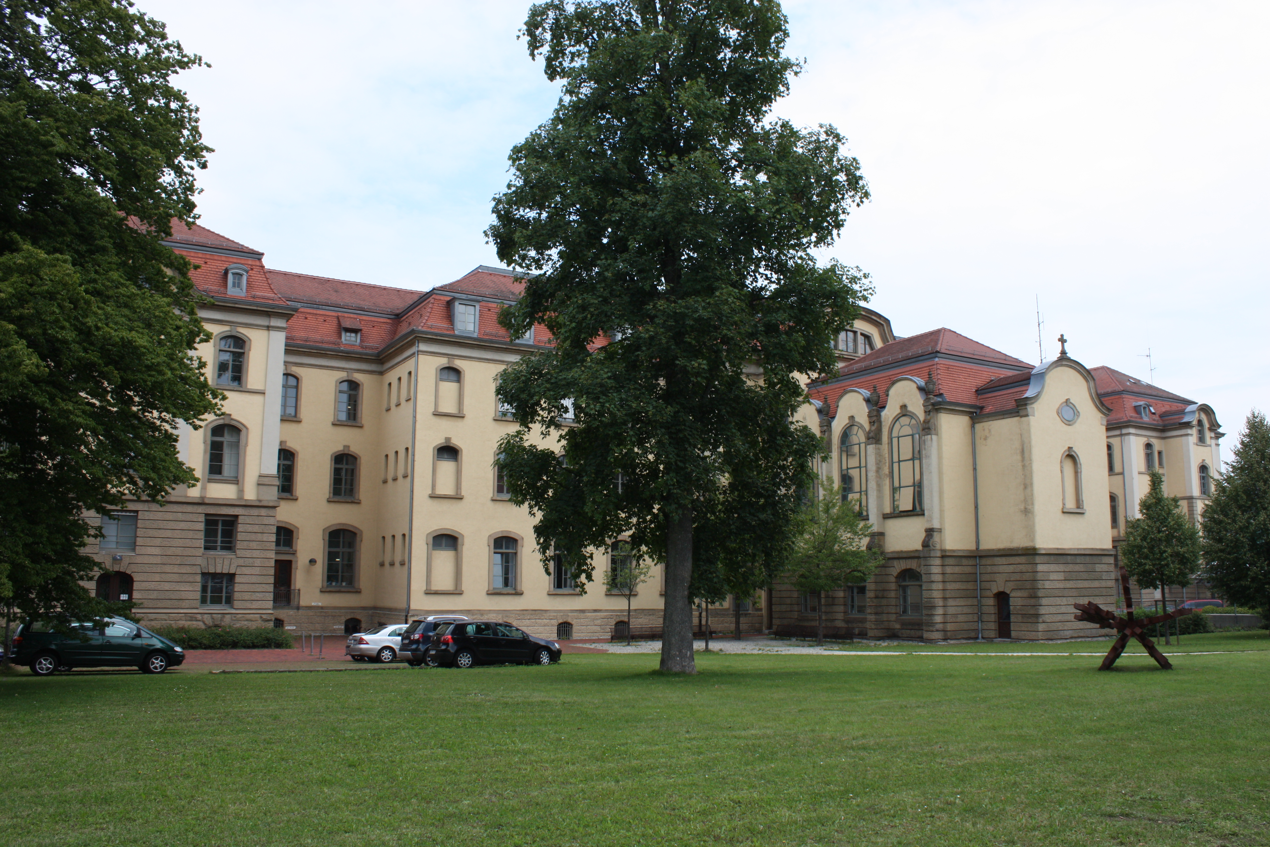 Alte PH Schwäbisch gmünd, Lessingstraße, heute Fachbereich Musik der PH und Polizeirevier